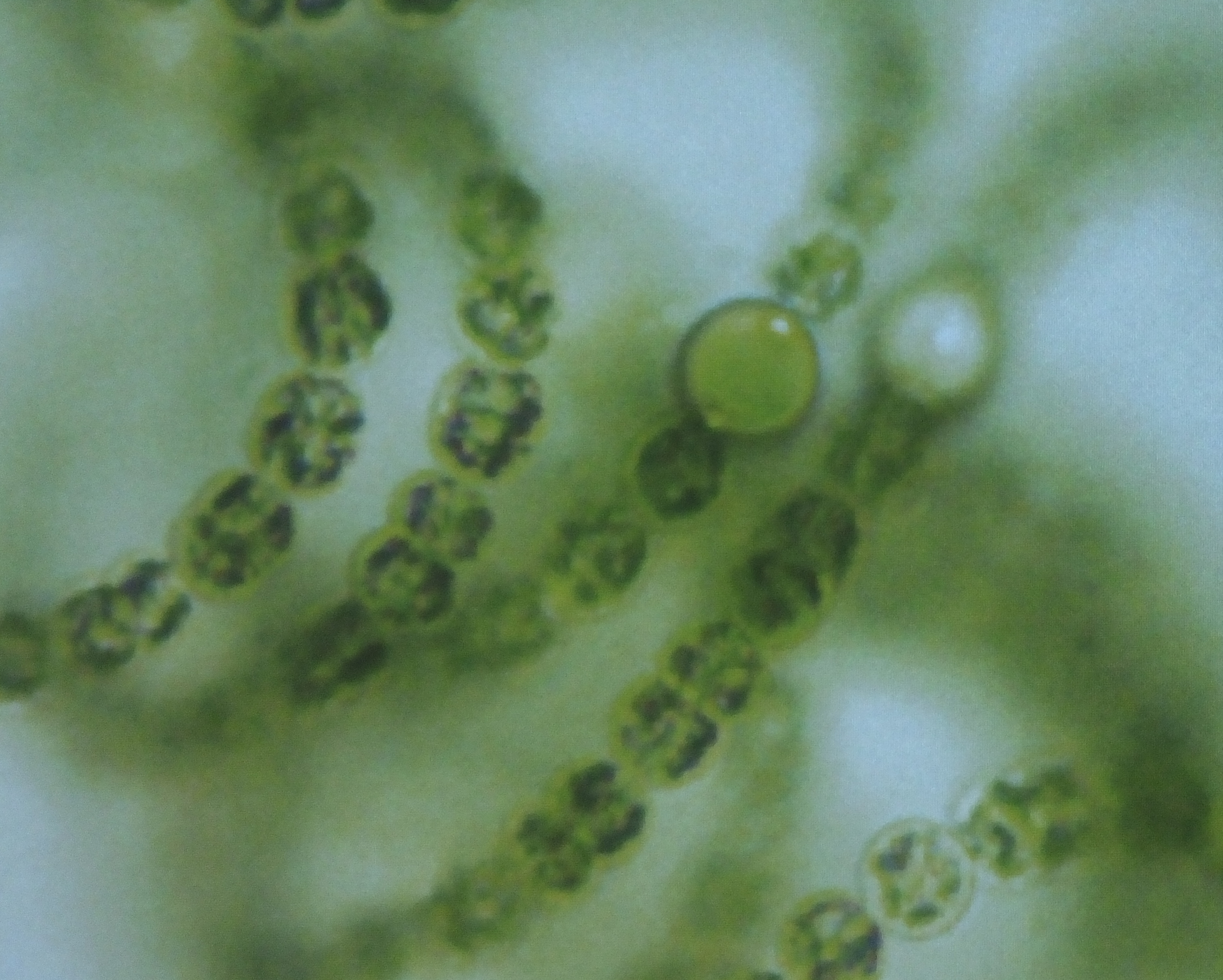 Dolichospermum crassum